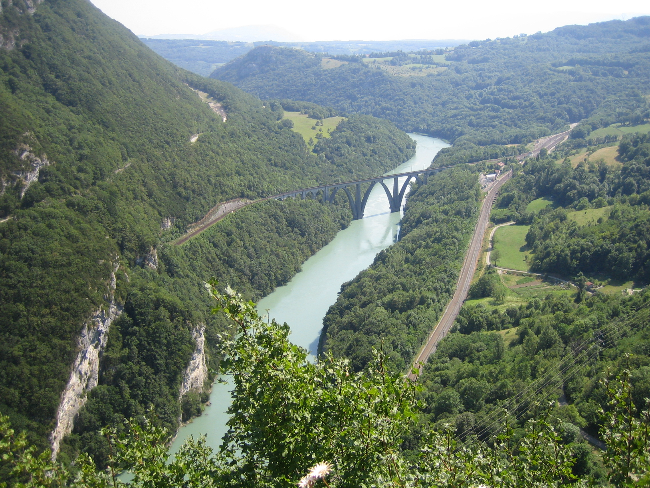 Le défilé de l'Ecluse - vue depuis le fort supérieur